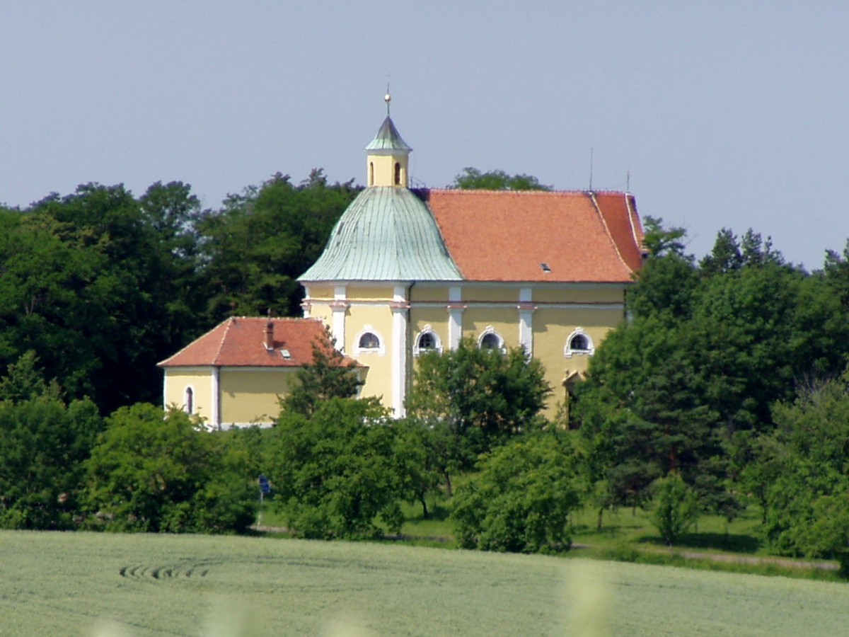 Poutní kaple sv. Antonína Paduánského mezi Ostrožskou Lhotou (okres Uherské Hradiště) a Blatnicí pod Svatým Antonínkem (okres Hodonín). Pohled z pole východním směrem od kaple (katastrální území Ostrožská Lhota).